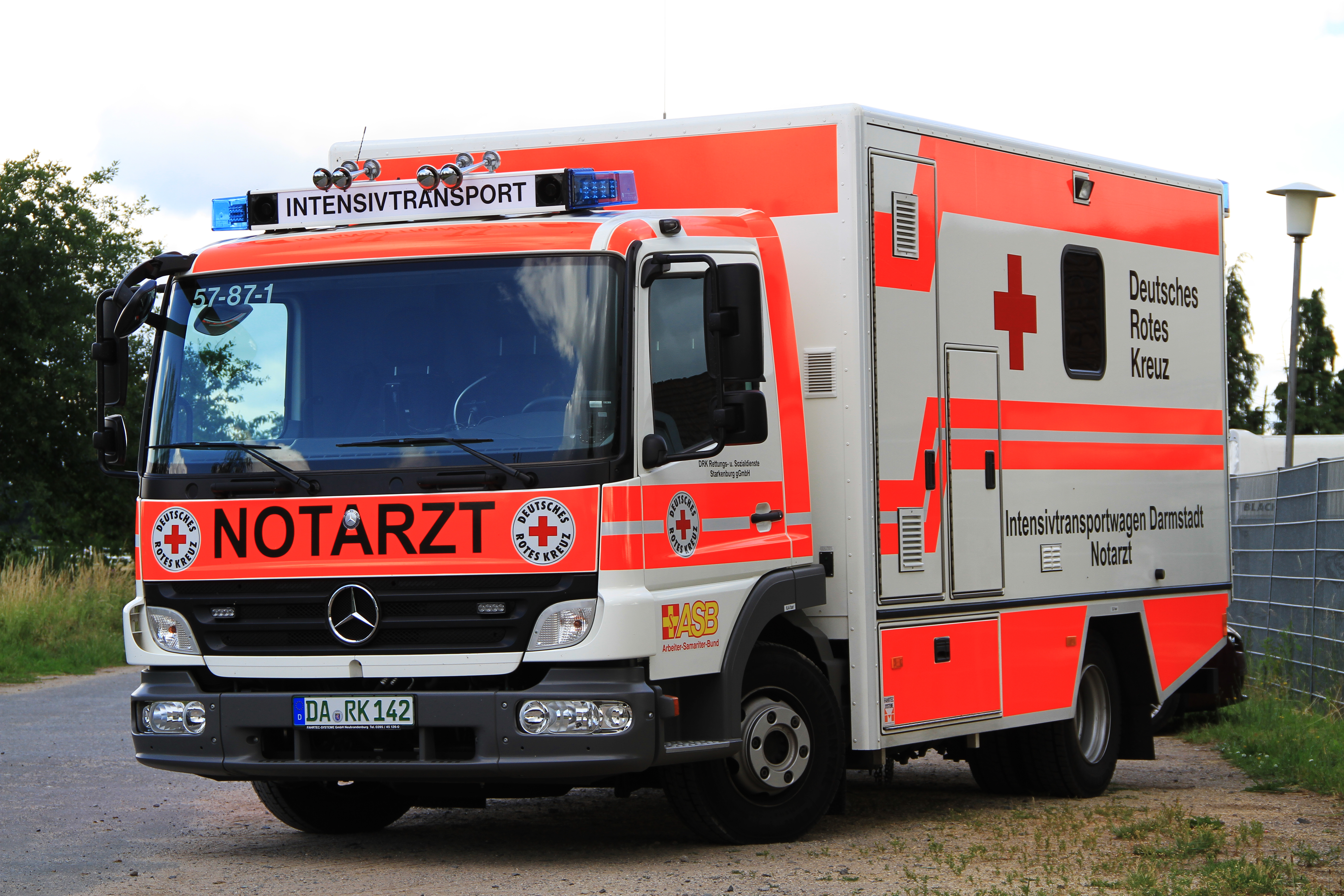 Intensivtransportwagen (ITW) Darmstadt Rotkreuz Darmstadt 57-87-1.